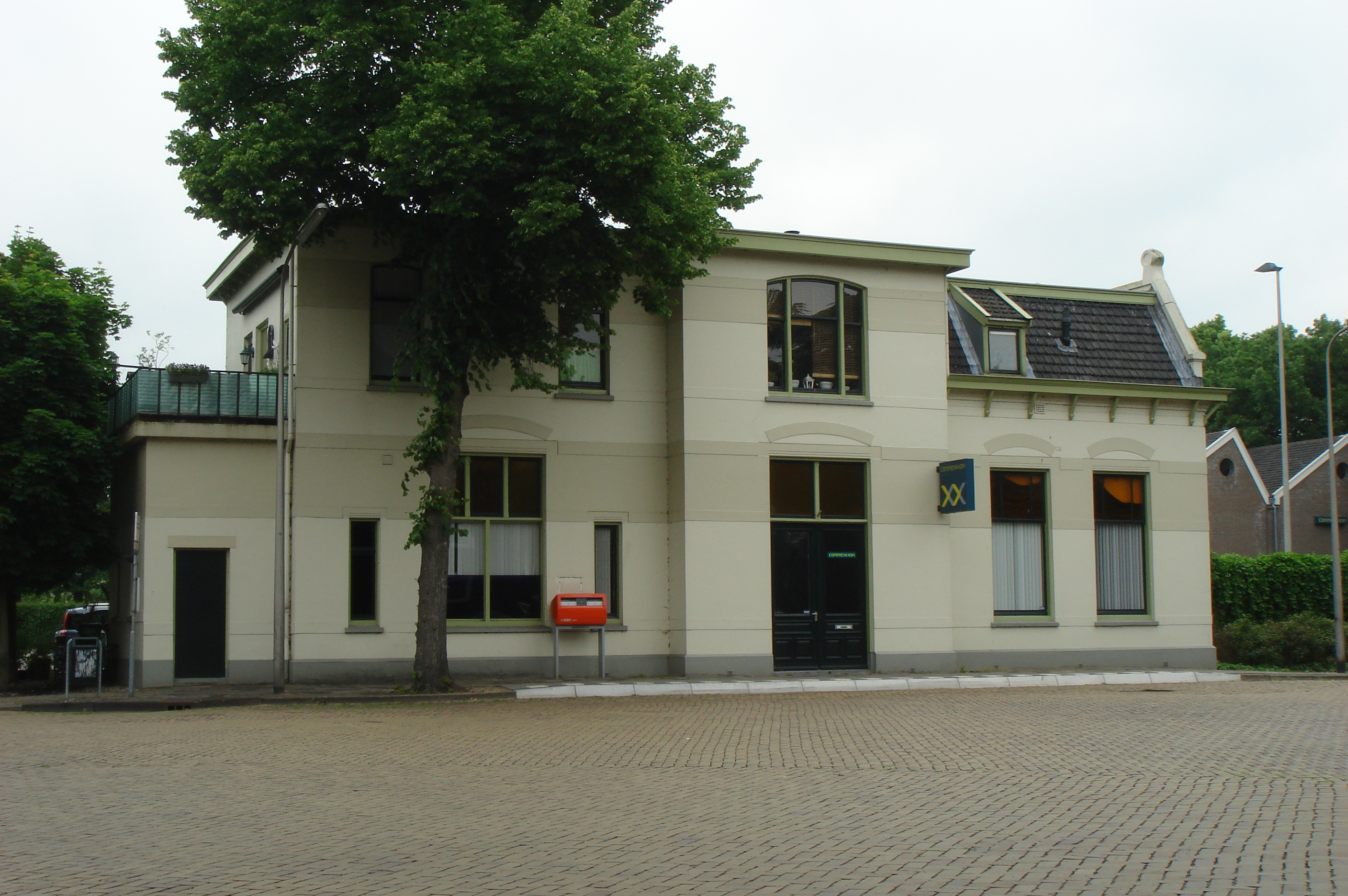 Voormalig tramstation Schoonhoven (foto: Daniel van der Ree)